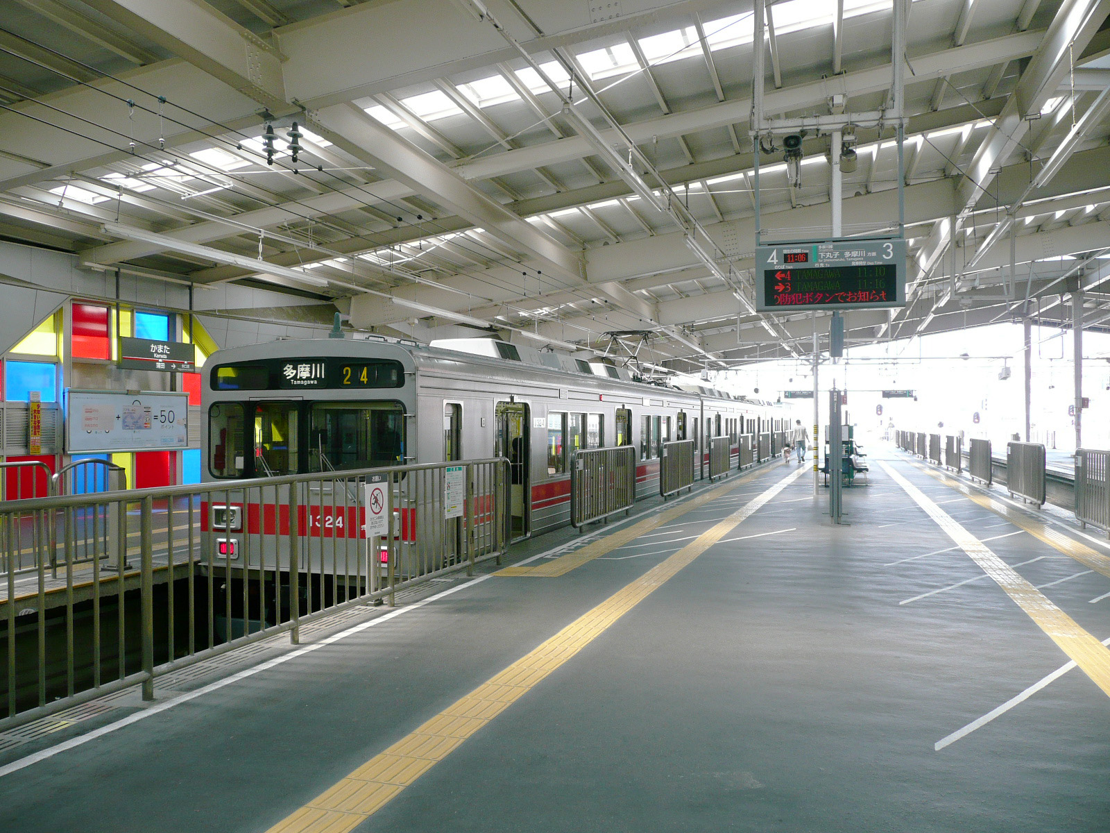 蒲田駅に停車中の東急多摩川線（1000系）